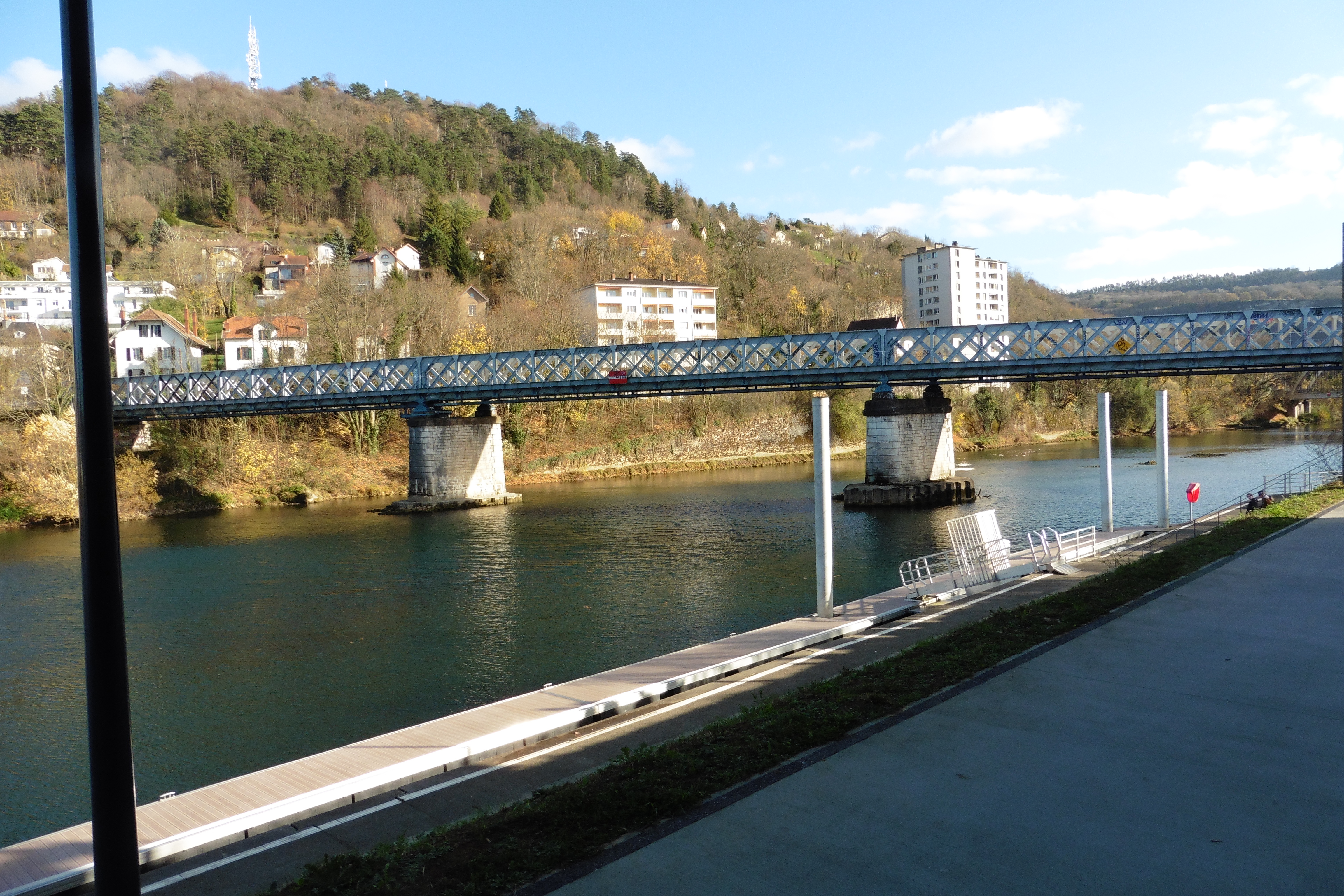 Ponts